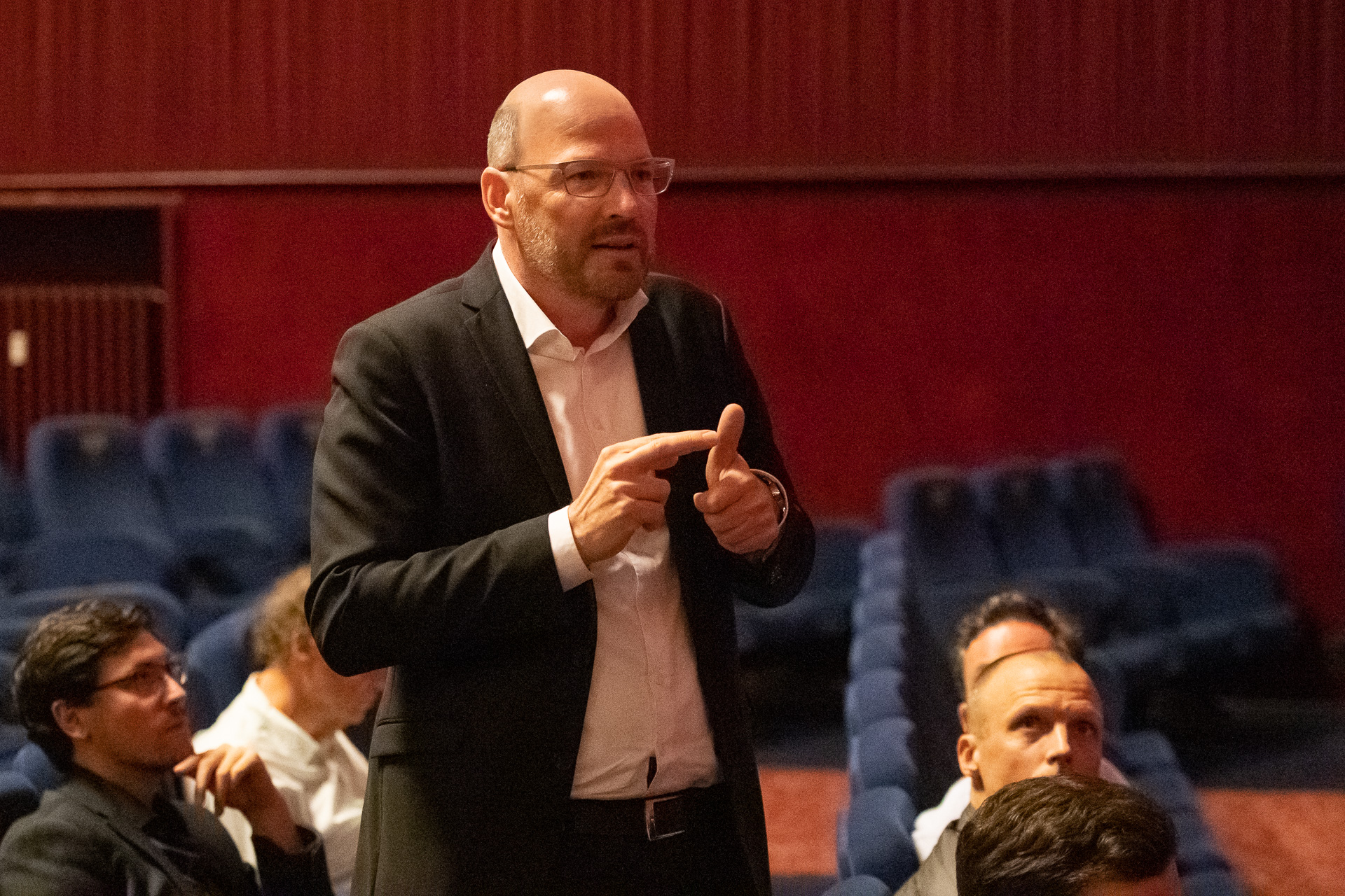 ˞Thomas Korbun bei der Filmvorführung von S4F im Delphi-Kino, Berlin